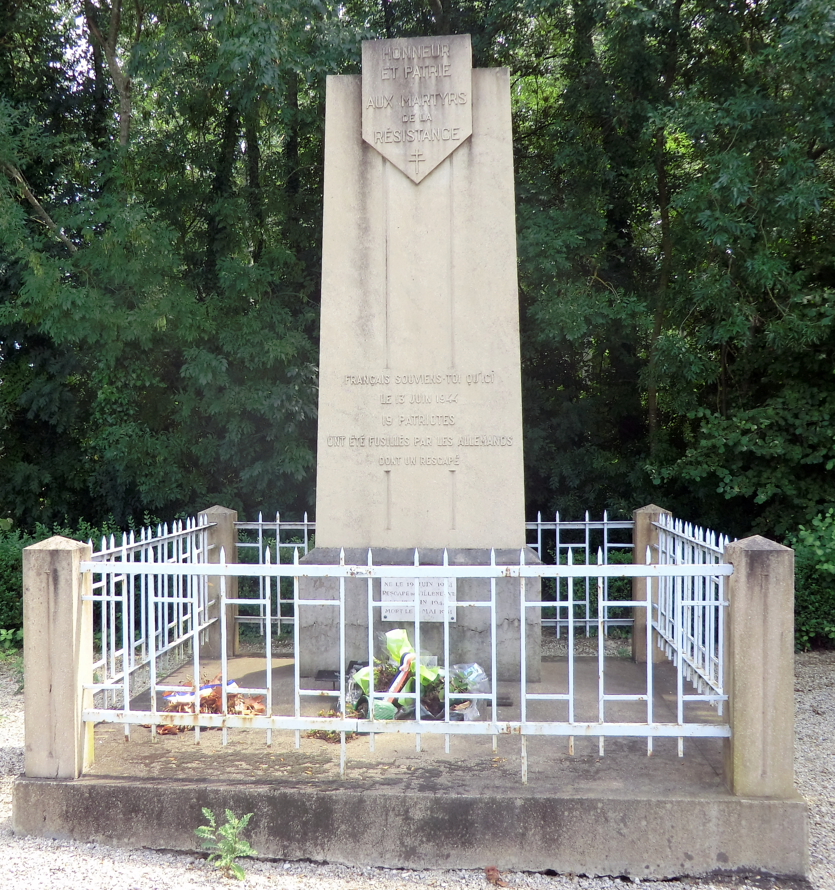 Monument des dix neuf fusillés de Villeneuve (Ain) dont Jean Gouailhardou et René Leynaud. Plusieurs victimes inconnues. Un survivant, Jacques Thoinet.